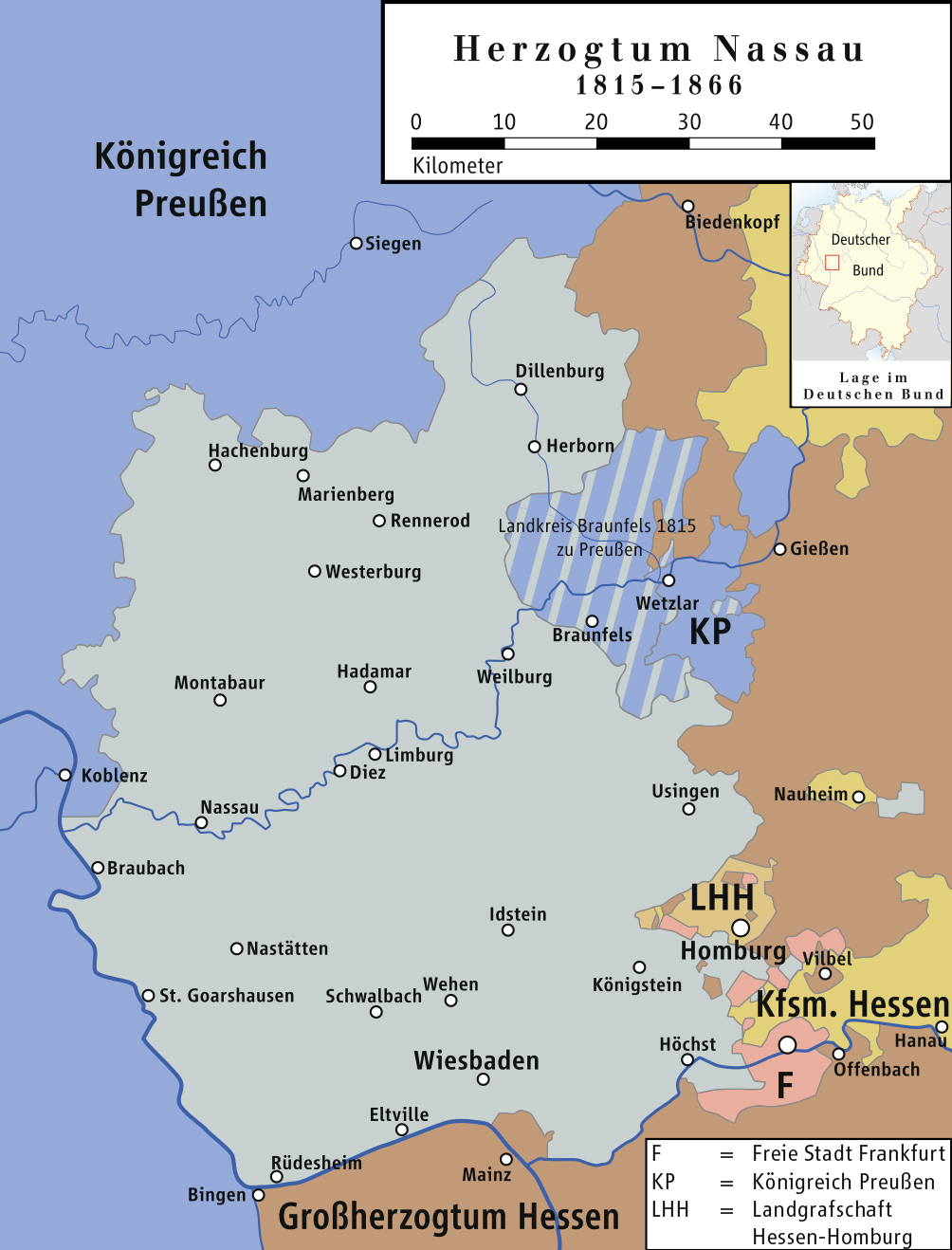 Karte des Herzogtums Nassau 1815–1866, die Ämter Braunfels, Greifenstein und Hohensolms sind schraffiert. Diese kamen nach dem Wiener Kongress zu Preußen (Landkreis Braunfels) und blieben Teil der Rheinprovinz, auch als das restliche Herzogtum Nassau 1866 Teil der preußischen Provinz Hessen-Nassau wurde.